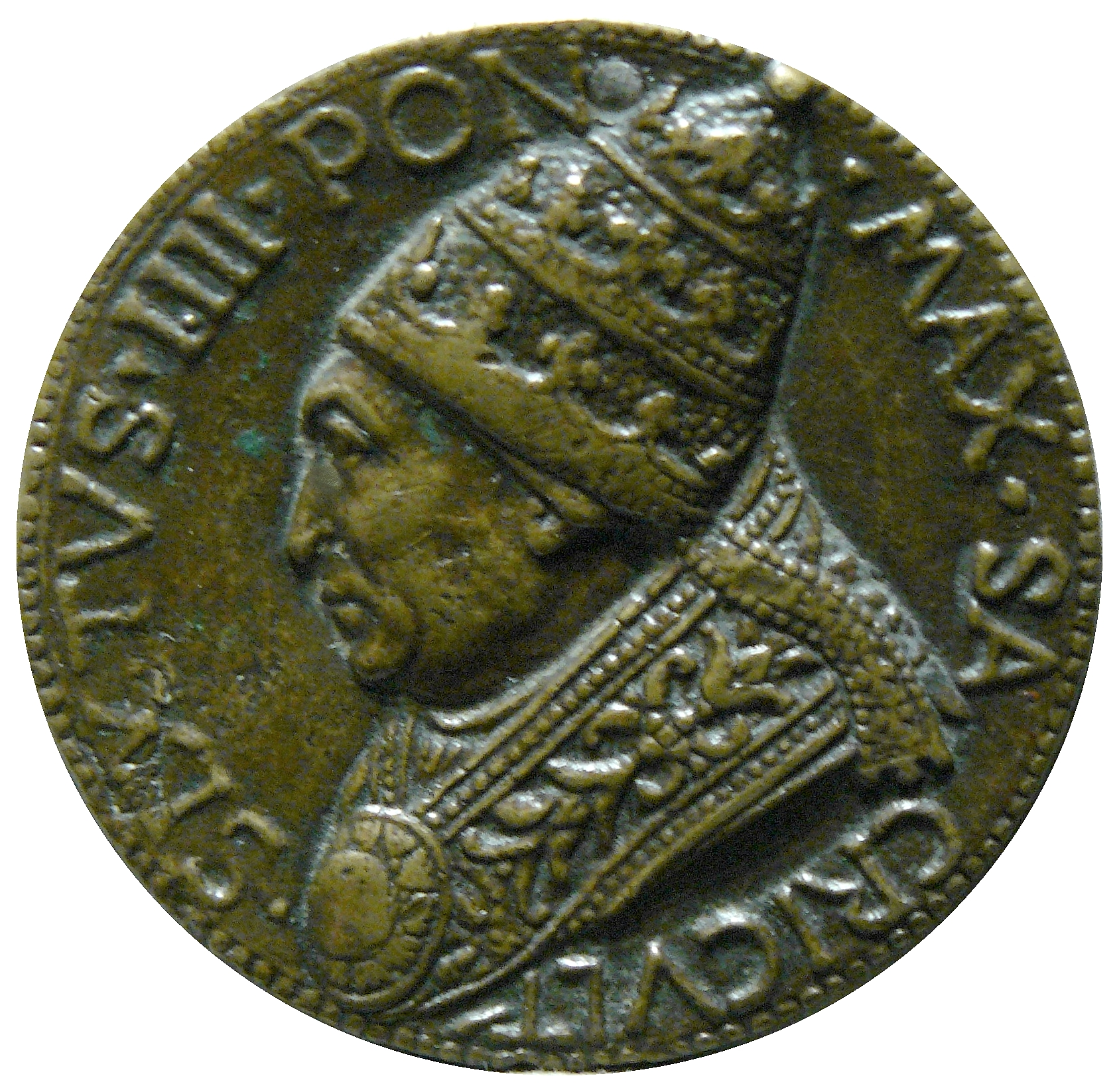 Médaille à l'effigie du pape Sixte IV par Andréa Guacialotti - Vers 1480, bronze, diamètre environ 3,5 cm - Musée du Louvre, Inv. n°OA 2455